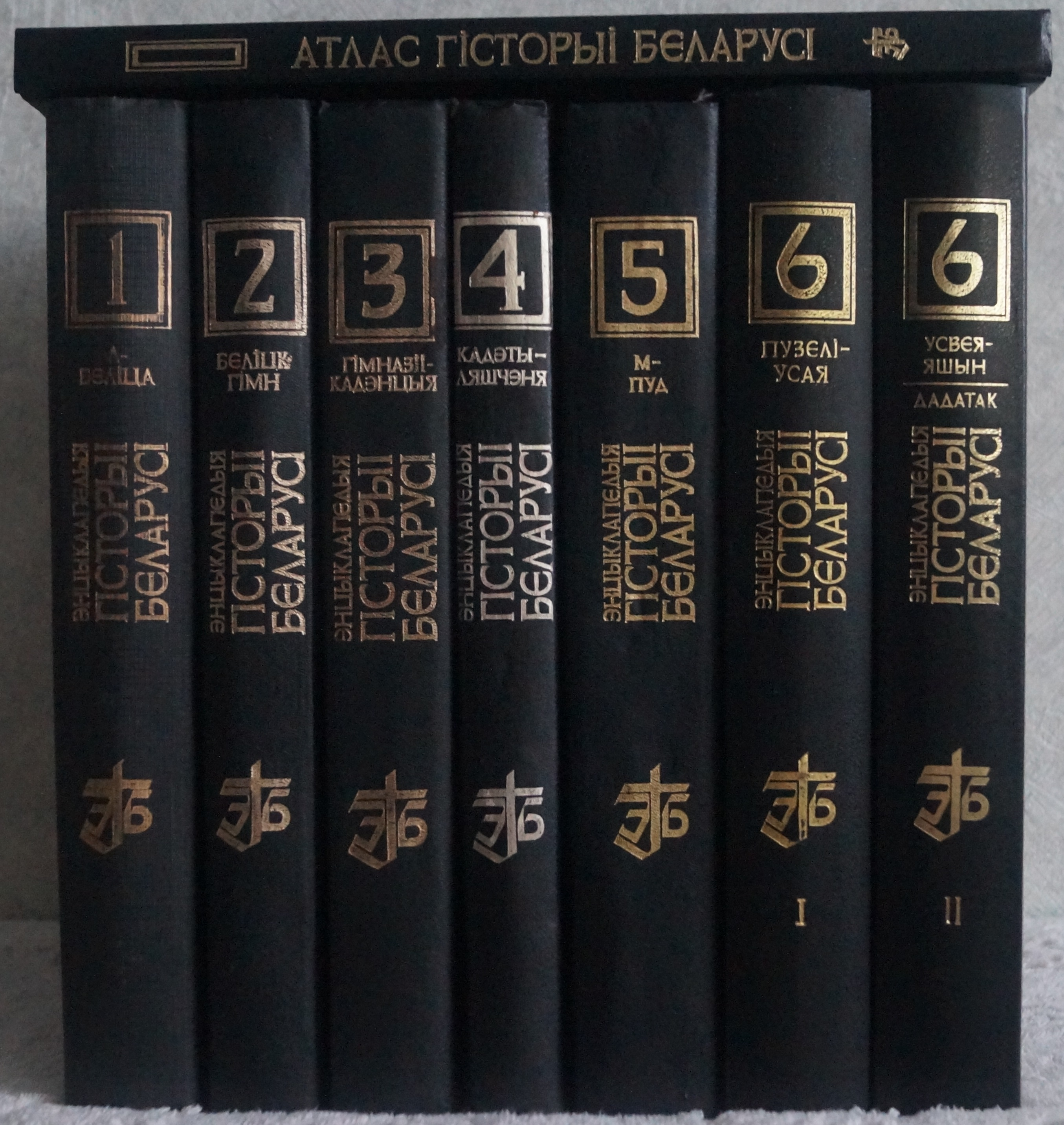 Беларуская (тарашкевіца): Энцыкляпэдыя гісторыі Беларусі, т. 1—6/2 + дадатак